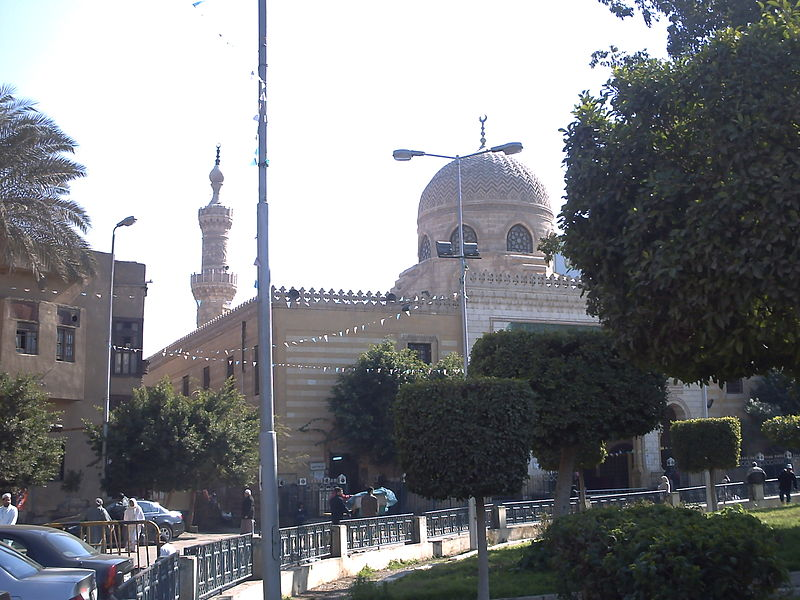 مسجدی در قاهره با آرامگاه سیده نفیسه، نتیجۀ حسن مجتبی